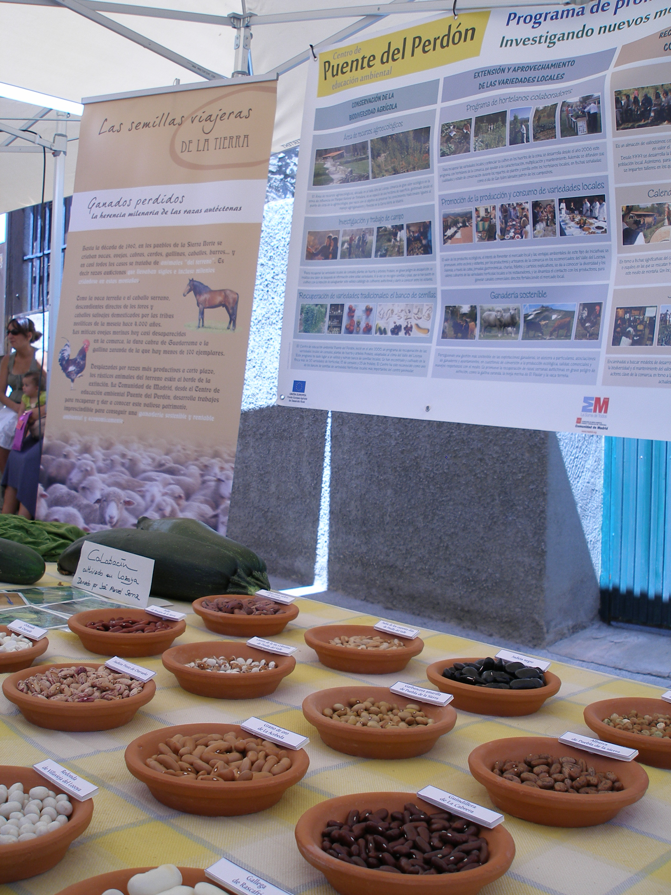 Banco de semillas del CV Puente del Perdón